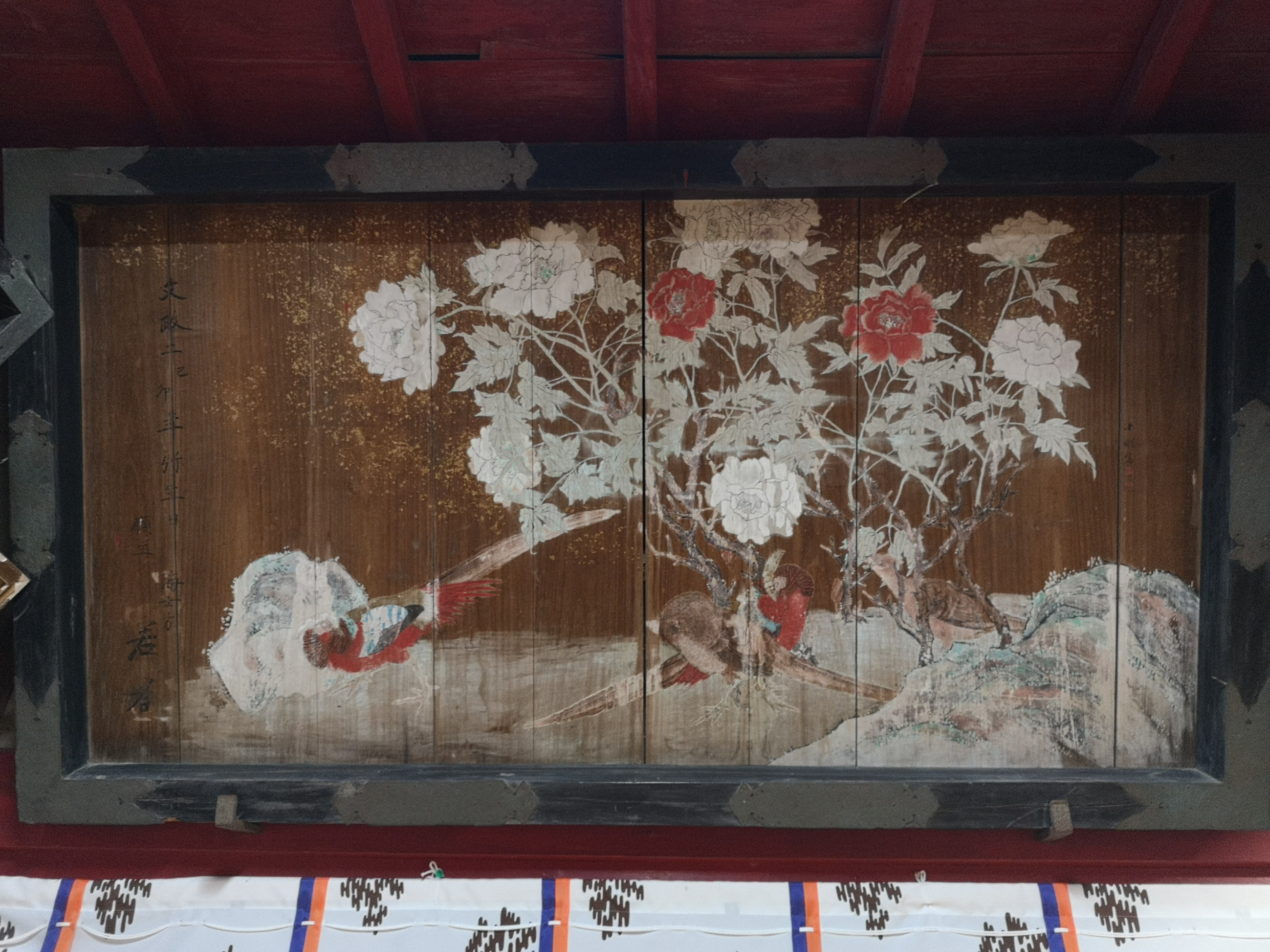 静岡県沼津市戸田にある部田神社 文化 文政2年奉納「花鳥之図」